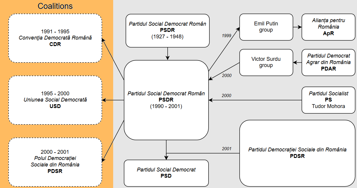 Diagramma evoluzione PSDR (Romania) 1990-2001 PSDR (Romania) evolution diagram 1990-2001 Diagrama evolutia PSDR (Romania) 1990-2001